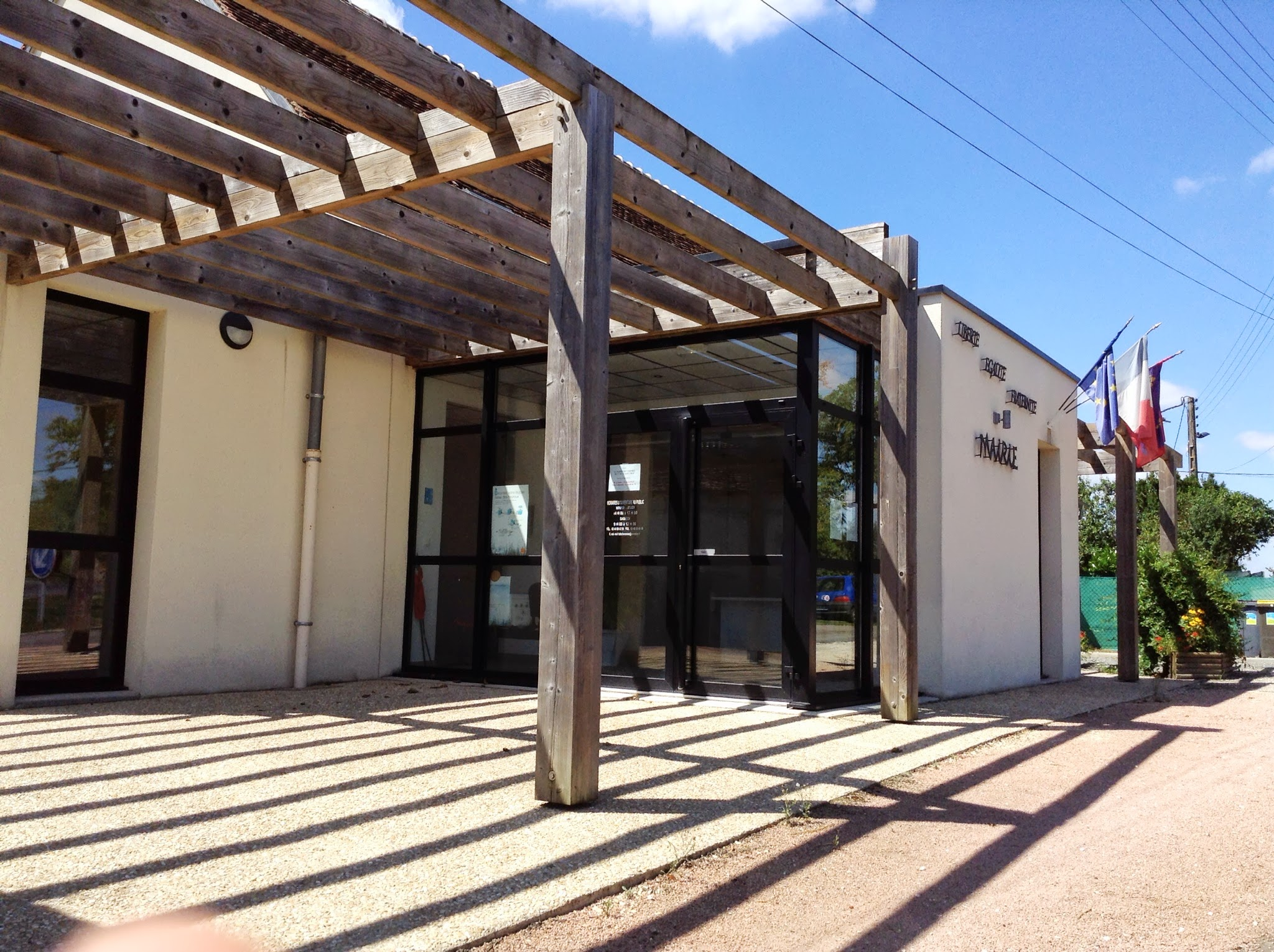 Mairie de Chavannes (Cher)